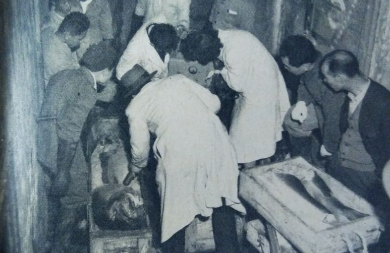 焼津で「原爆マグロ」を検査する、大阪市立大学生物学部助教授の西脇安ら